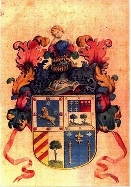 Escudo de armas de la familia Ortiz de Rozas